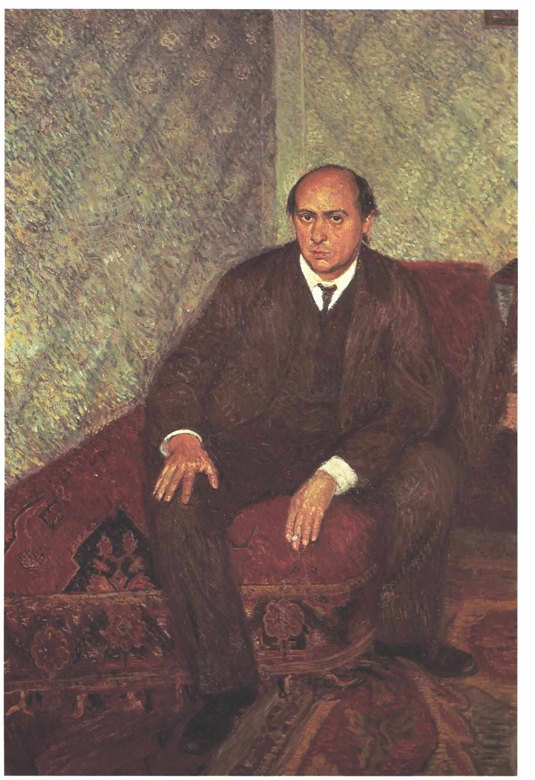 Portrait of Arnold Schönberg